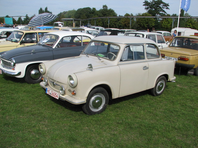 Trabant